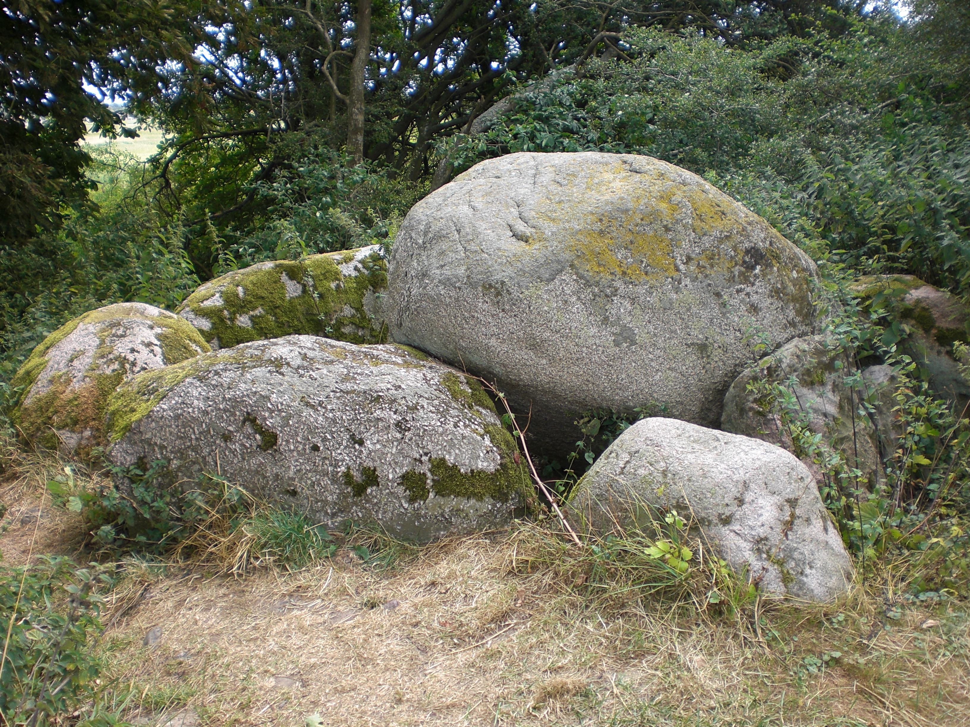 Großdolmen Goldbusch auf Rügen